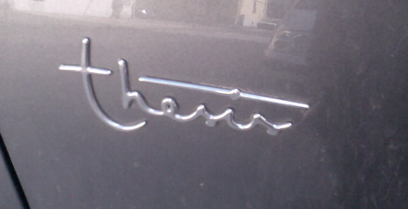 il marchio Thesis dell'omonimo modello